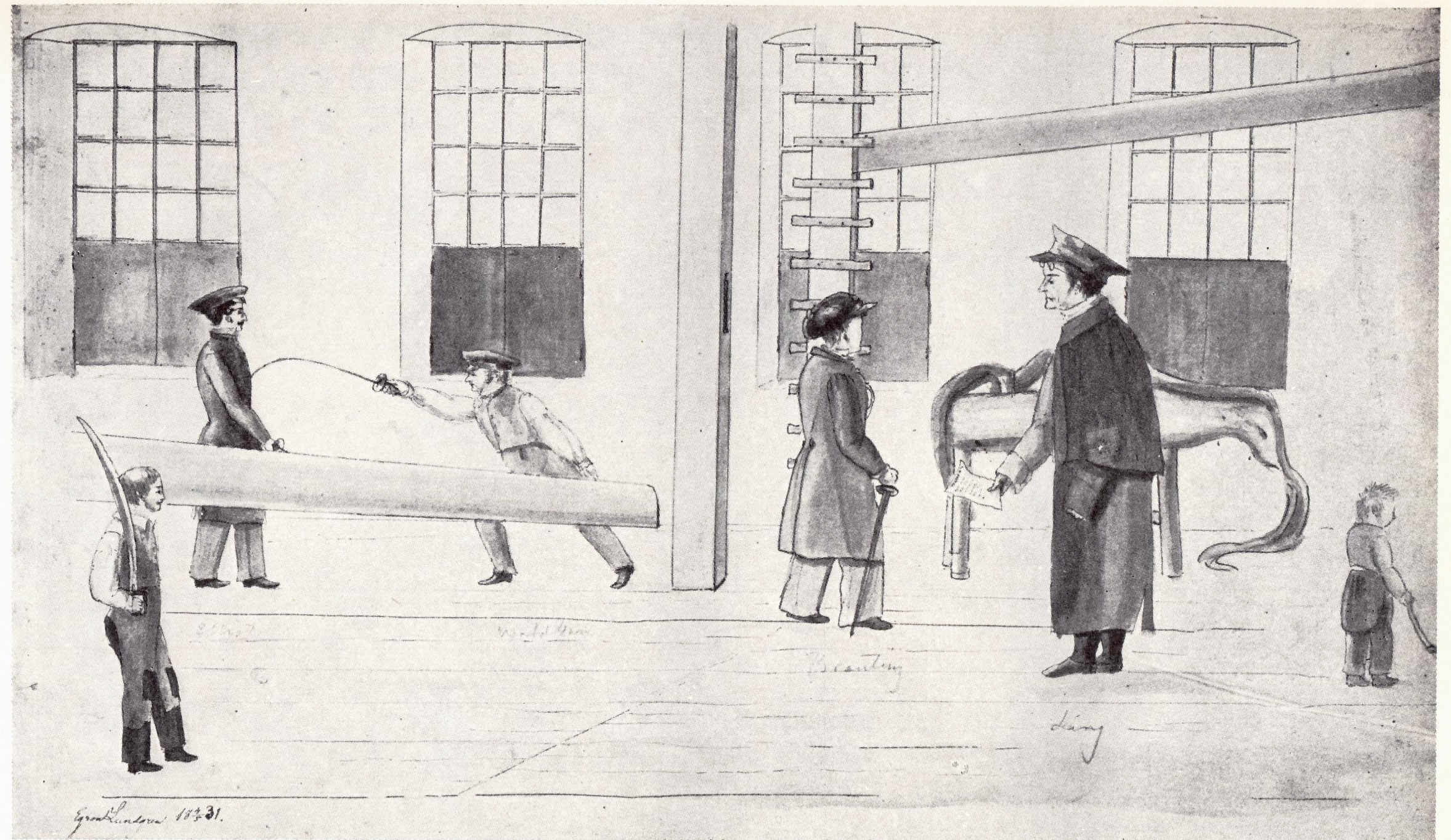 Pehr Henrik Ling i gymnastik- och fäktsalen. Teckning av Egron Lundgren har 1839. Ling med slängkappa över axlarna, glasögonen uppskjutna i pannan och ett gymnastikprogram i handen. Den ljusklädde av de bägge fäktlarna är konstnären Carl Wahlbom — Nordiska museet.